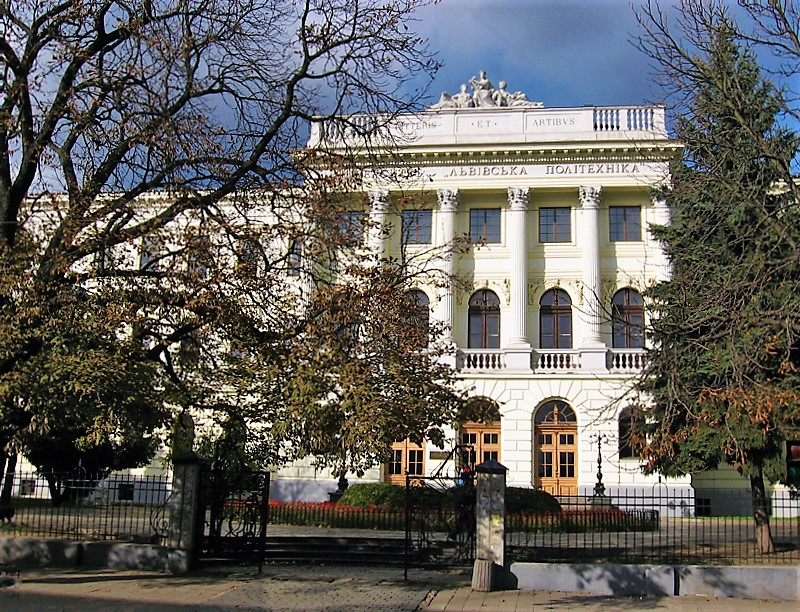 Главный корпус Львовской политехники